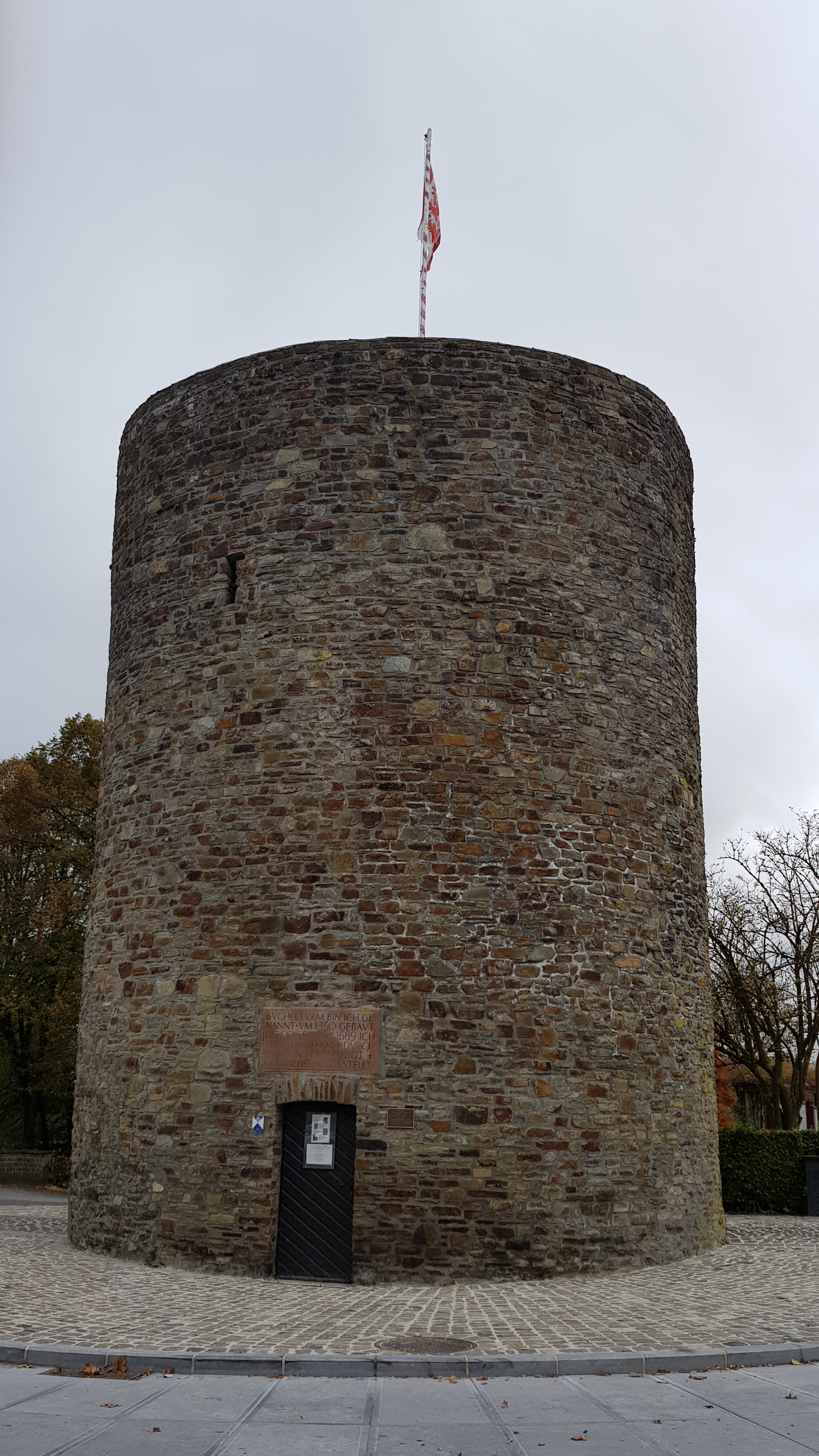 Büchelturm, Sankt Vith, Belgien This photo of immovable heritage has been taken in the Walloon Region